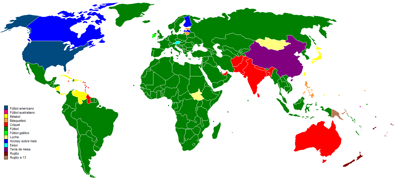 Mapa que muestra los deportes mas populares en cada país.